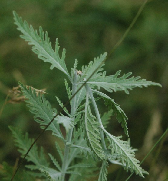 Perovskia atriplicifolia, leaves